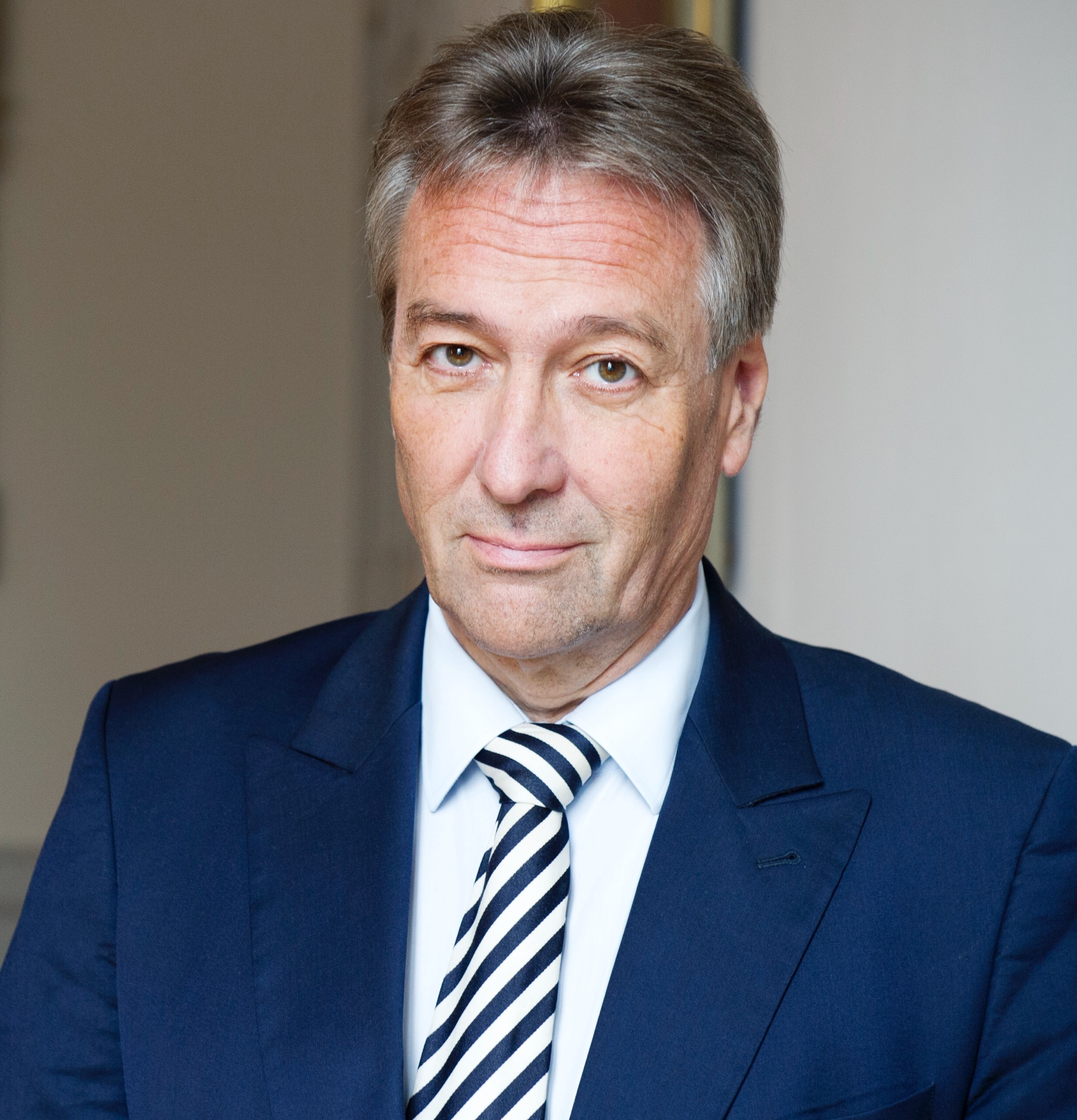 Portraitfoto von Jürgen Nimptsch